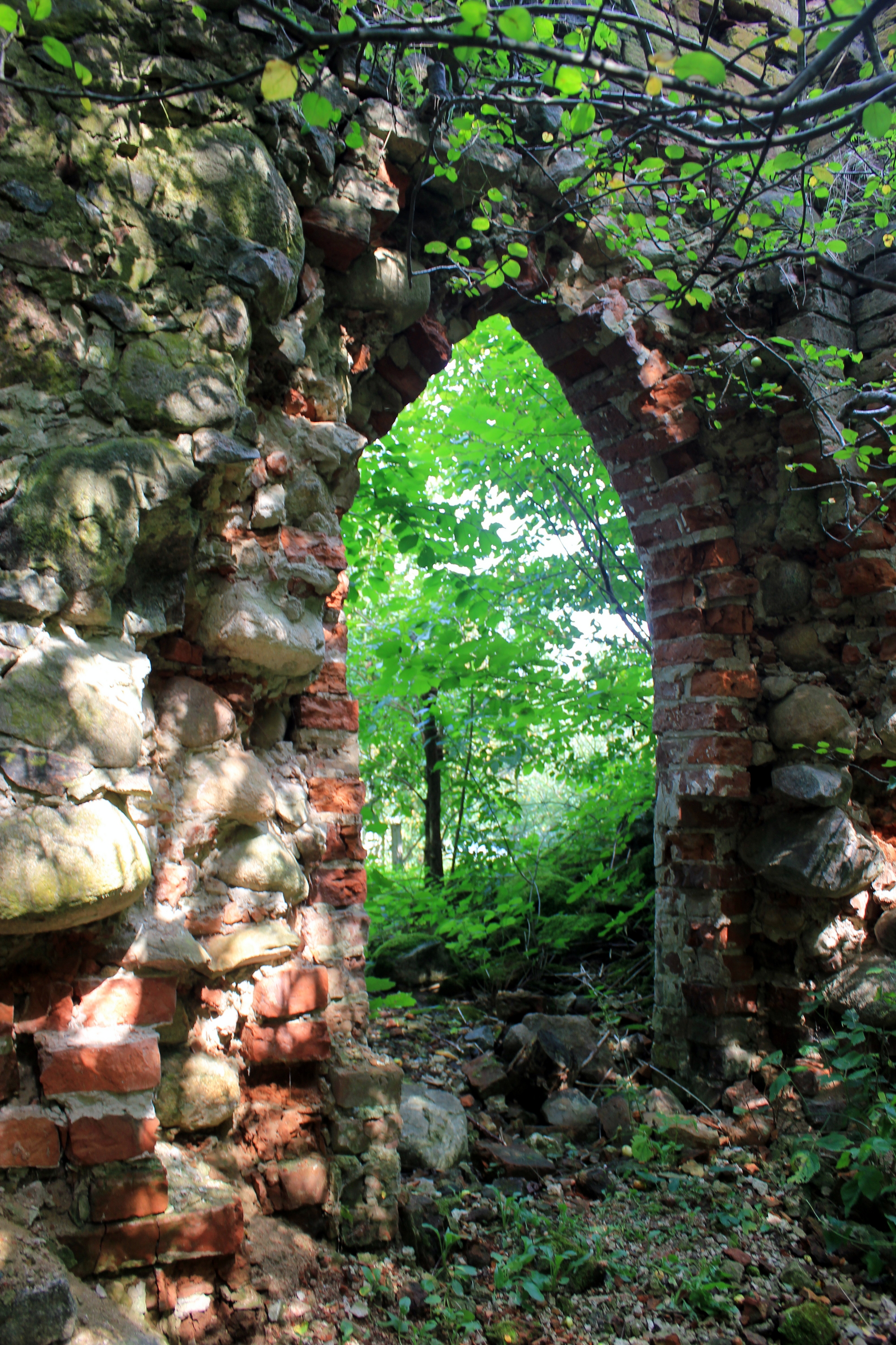 Überbleibsel der Kirche Medenau in Logwino, Kaliningrader Oblast.